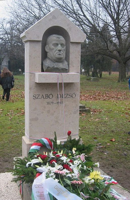 Szabó Dezső (Kolozsvár, 1879. jún. 10. – Bp., 1945. jan. 5.) író, kritikus, publicista sírja Budapesten. Kerepesi temető: 24-1-16.